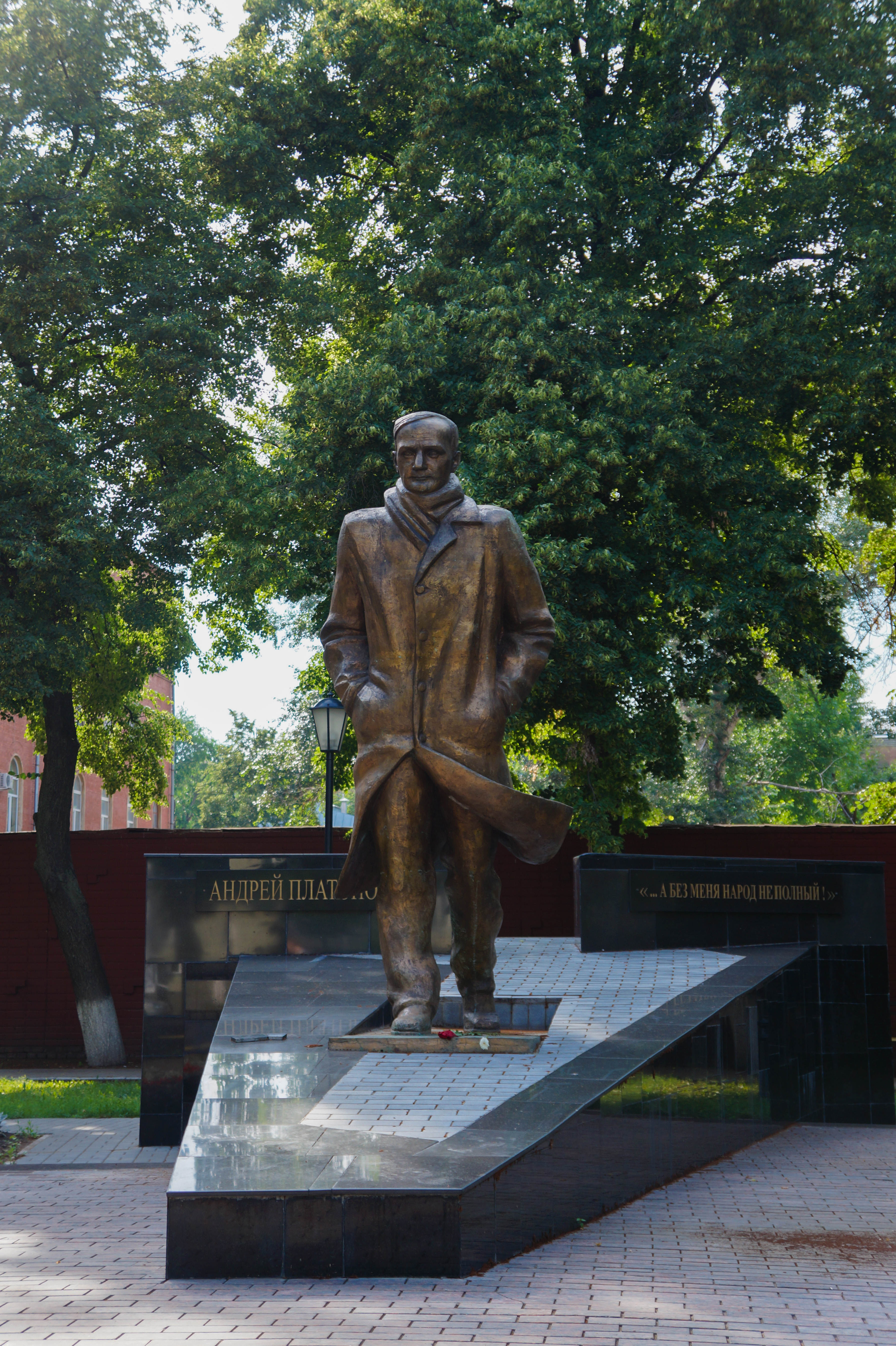 Памятник А. П. Платонову: проспект Революции, 24, Воронеж, Воронежская область